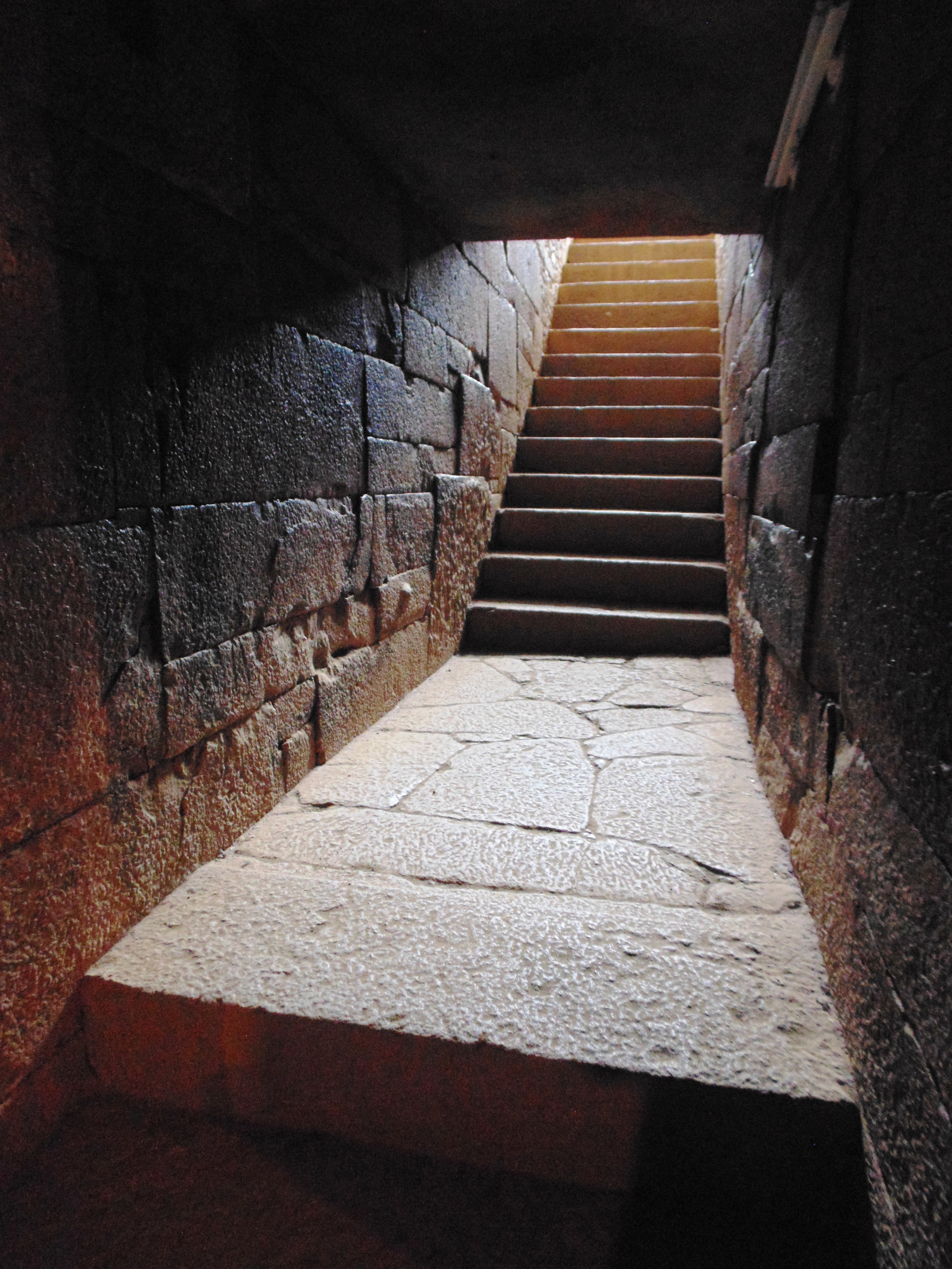 Вхід до скарбниці царя Гебре Мескеля (відомої також як "гробниця Гебре Мескеля") в Аксумі